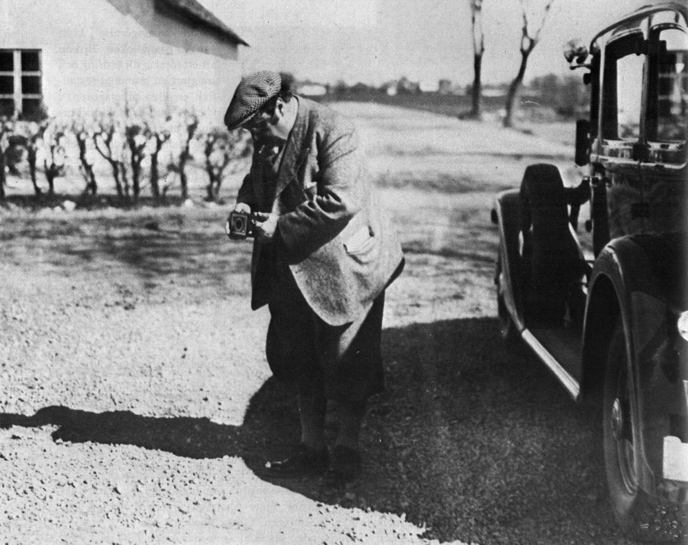 Lubbe Nordström på reportageresan om Lort-Sverige